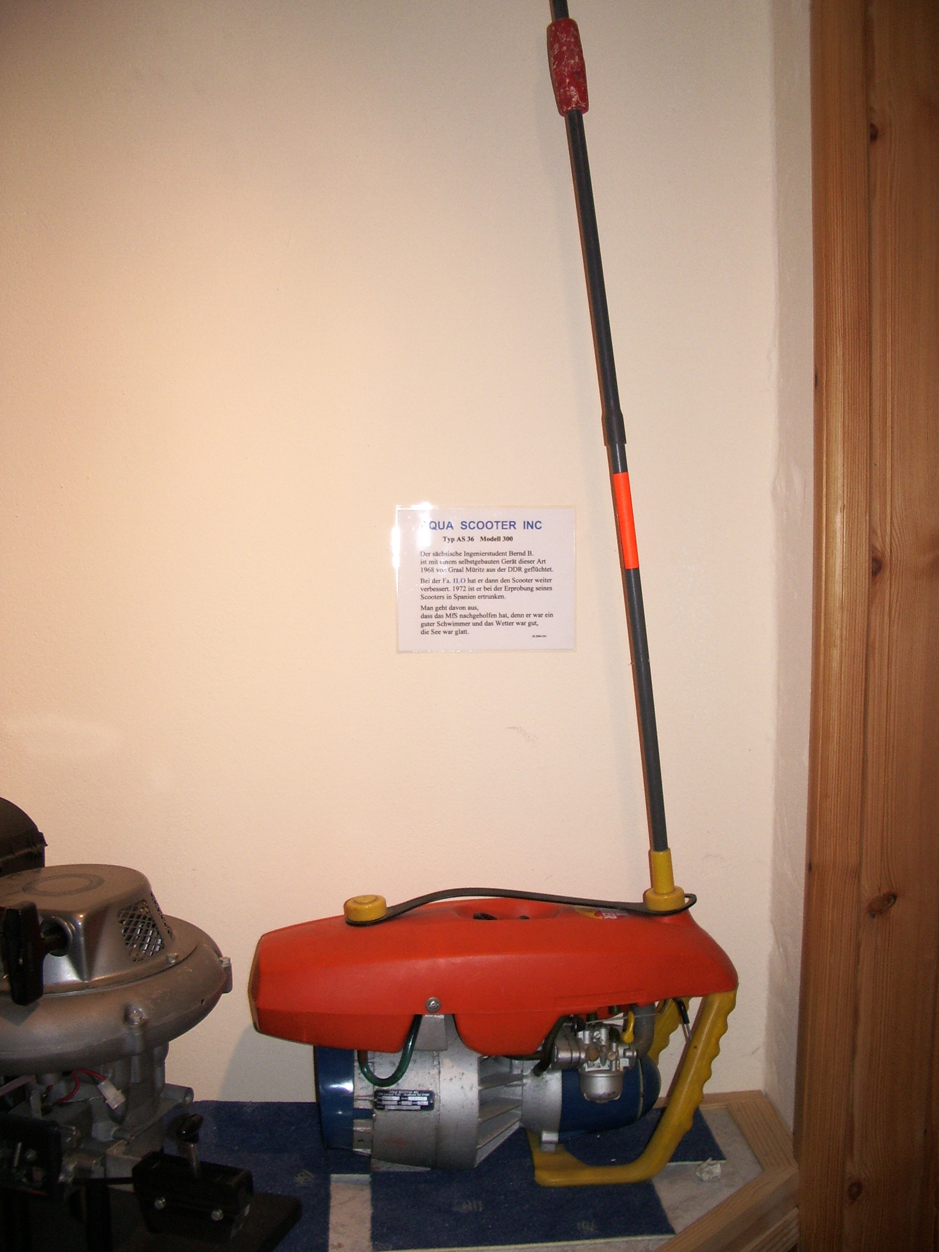 Ilo Aquascooter Typ AS 36 im Stadtgeschichtlichen Heimatmuseum Uetersen